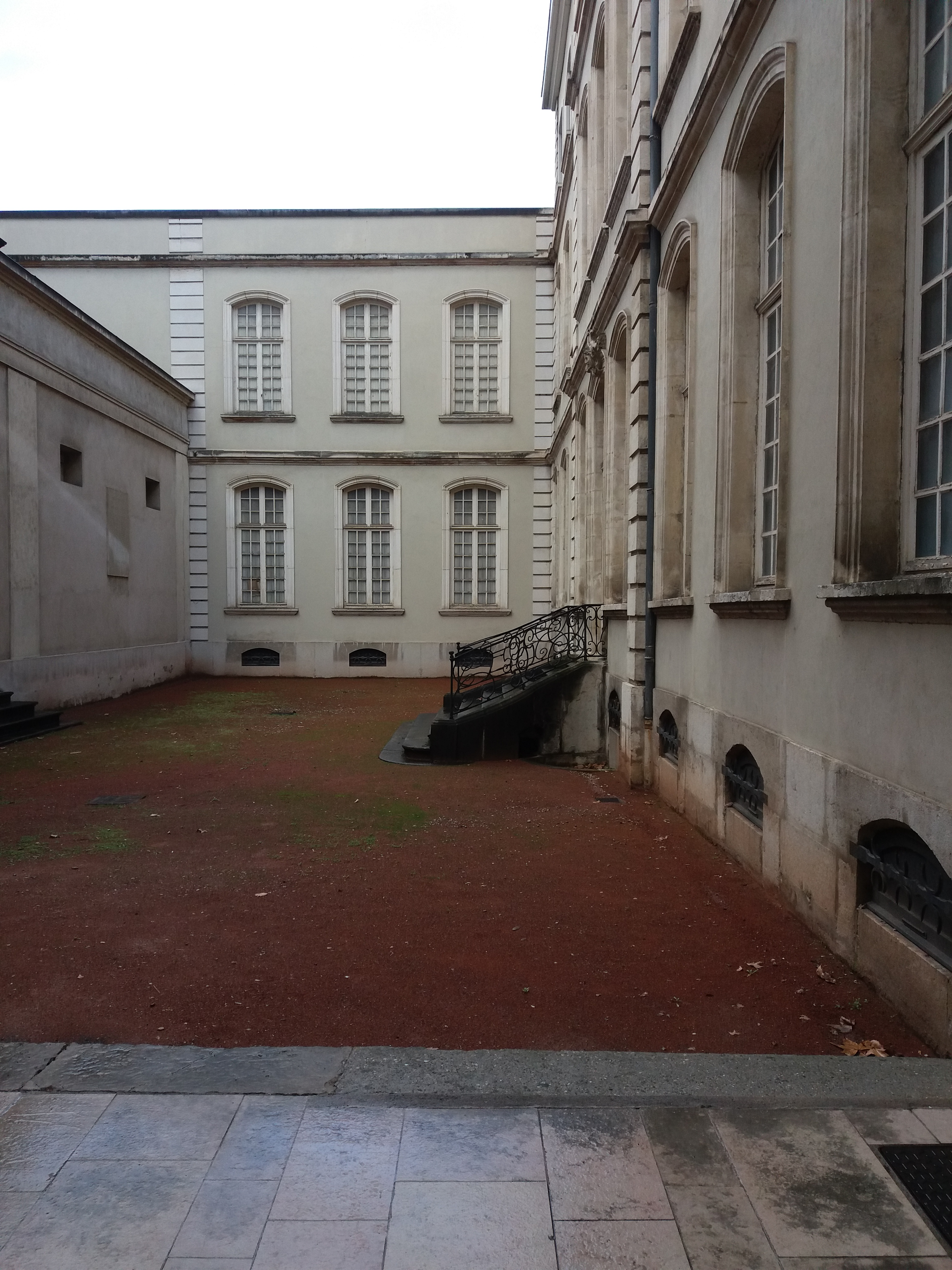 Cour à l'arrière du bâtiment.